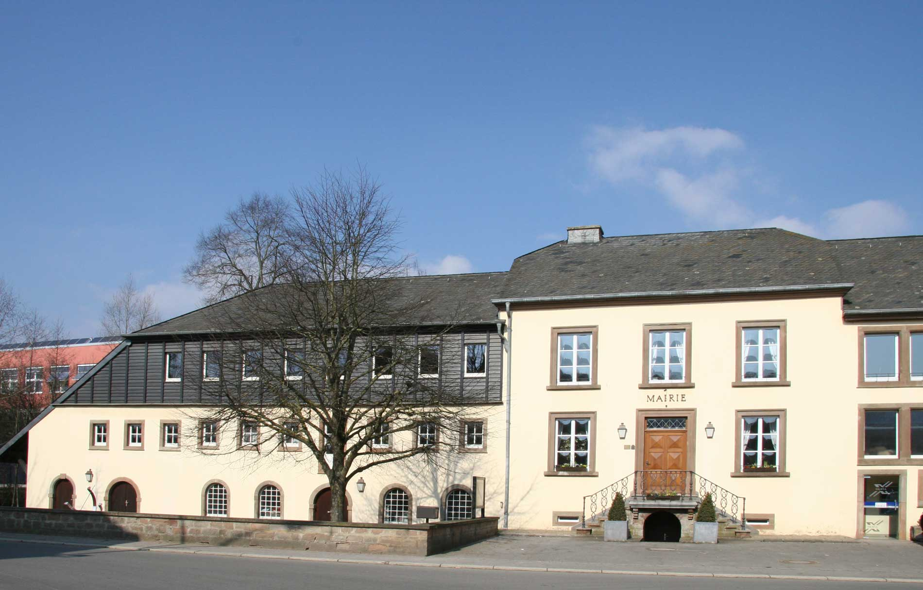 Sujet: D'Gemengenhaus vu Mäerzeg. Auteur: Rob Deltgen, 2012. Lizenz